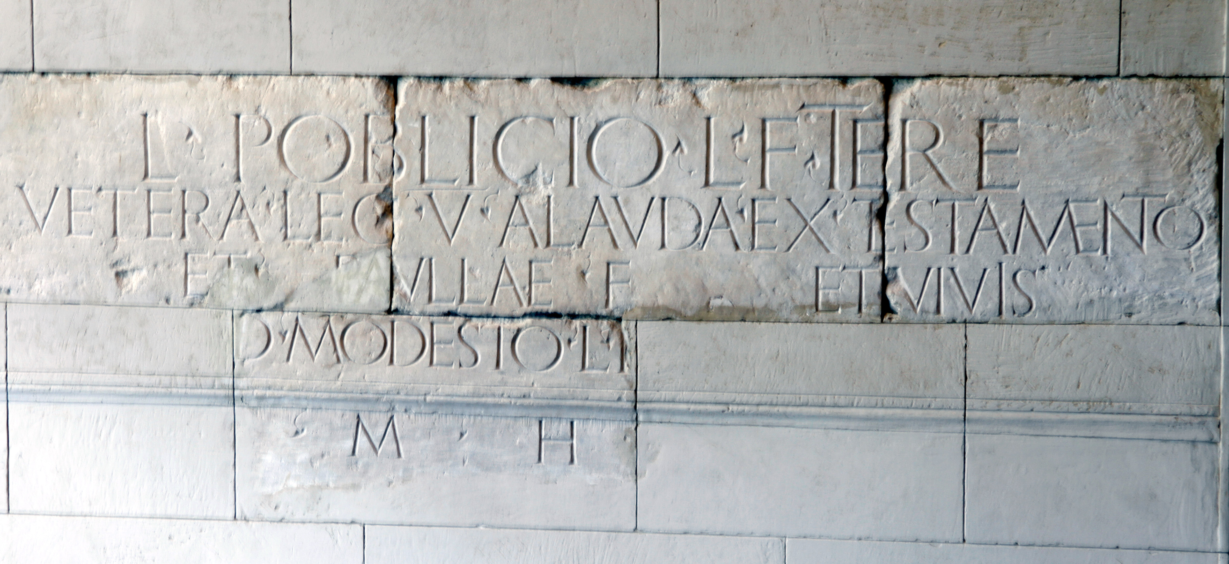 Bust - Römisch-Germanisches Museum - Cologne. AE 1979, 412 = AE 2013, 1116 = RSK 216 = IKoeln 311: L(ucio) Poblicio L(uci) f(ilio) Tere(tina) / vetera(no) leg(ionis) V Alauda(e) ex testamento / et Paullae f(iliae) et vivis / [--- coniugi] / [et L(ucio?) Poblicio --- f(ilio)] / [et libertis] / [L(ucio) Poblici]o Modesto L(ucio) P[oblicio ---] / [h(oc)] m(onumentum) h(eredem) [n(on) s(equetur)]